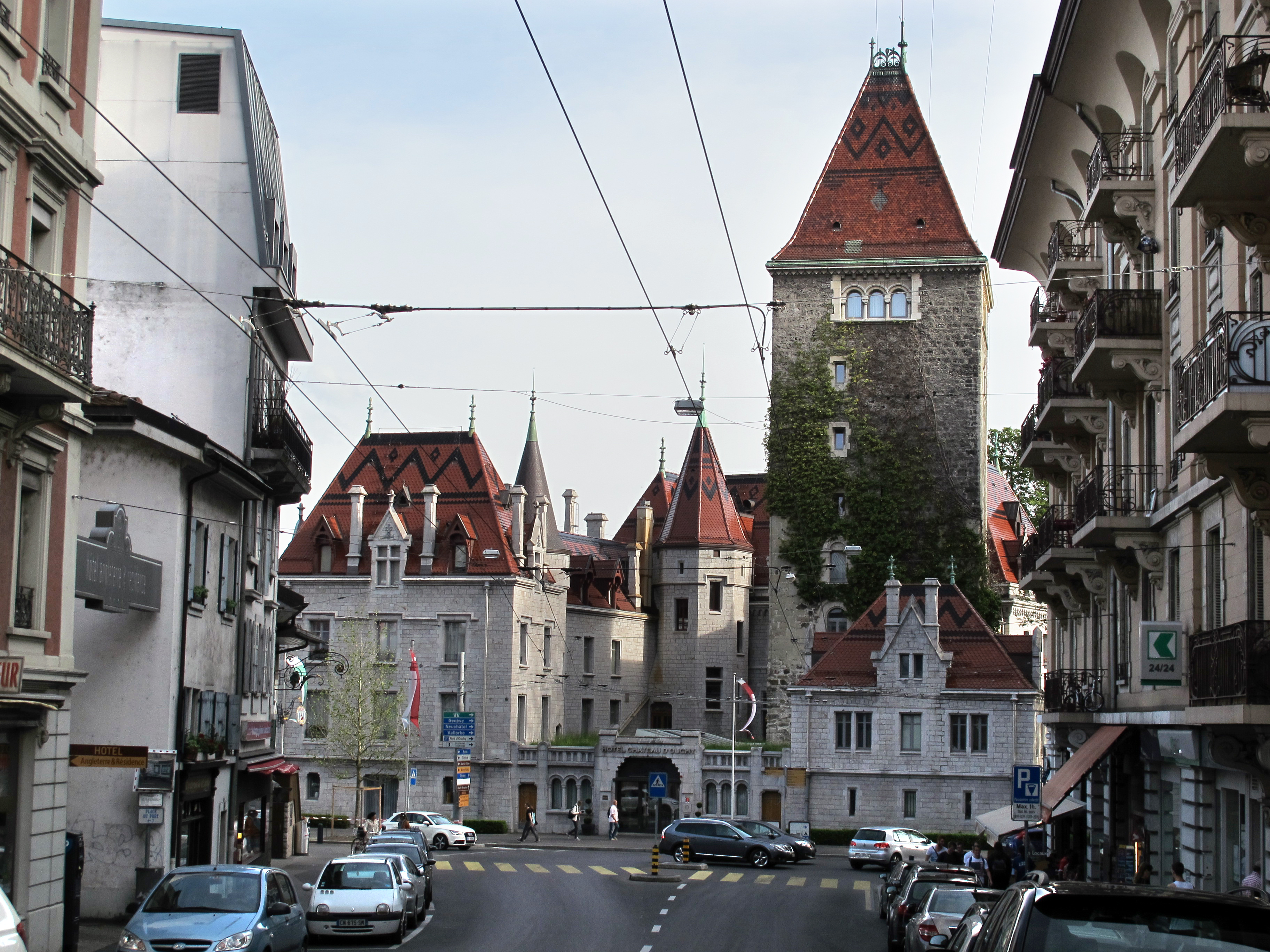 Losanna, Svizzera